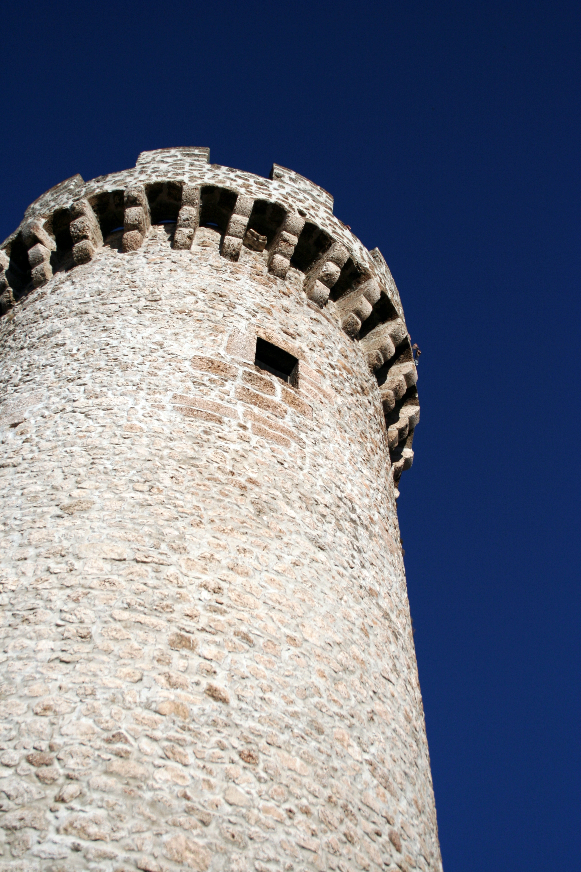 Santo Stefano Sessiano, Abruzzo, ItaliaTorre Medicea